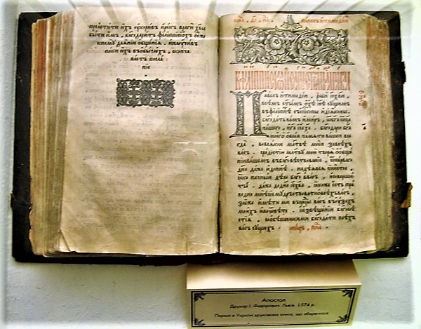 Апостол_Івана_Федоровича_1574.jpg: Розворот книги "Апостол", віддрукованої у Львові в 1574 році. Найстаріша друкована в Україні книга, що збереглася